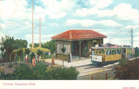 Ferrovia Vesuviana - Stazione